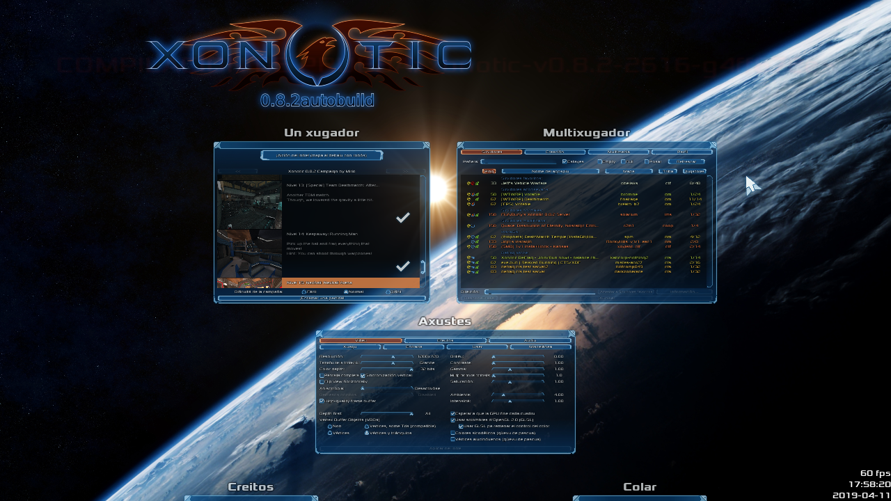 Captura del menú n'asturianu de Xonotic, versión 0.8.2autobuild